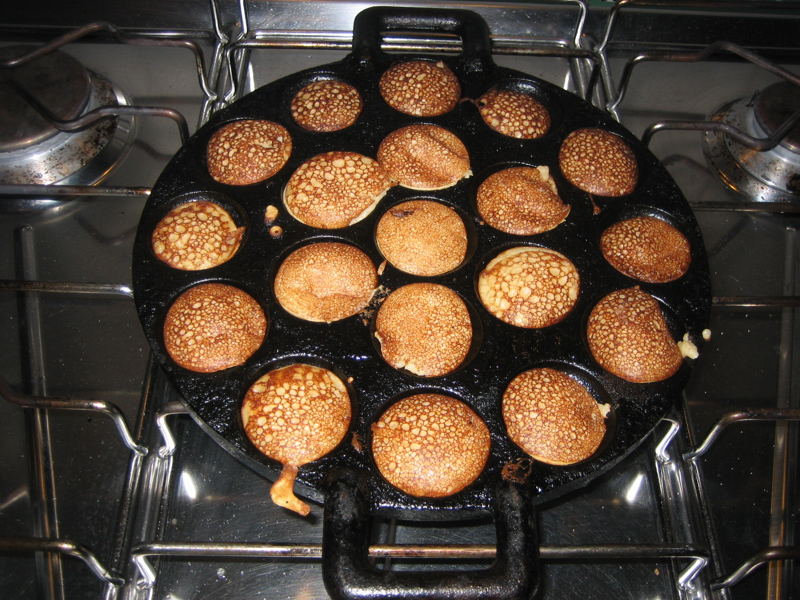 Gietijzeren poffertjespan met poffertjes Small pancakes being made in castiron pan